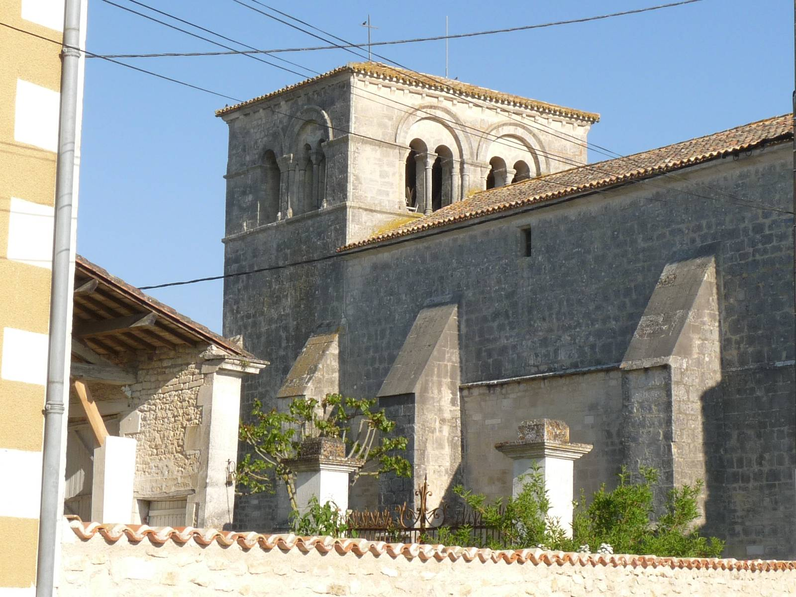 Eglise de Genac, Charente, France